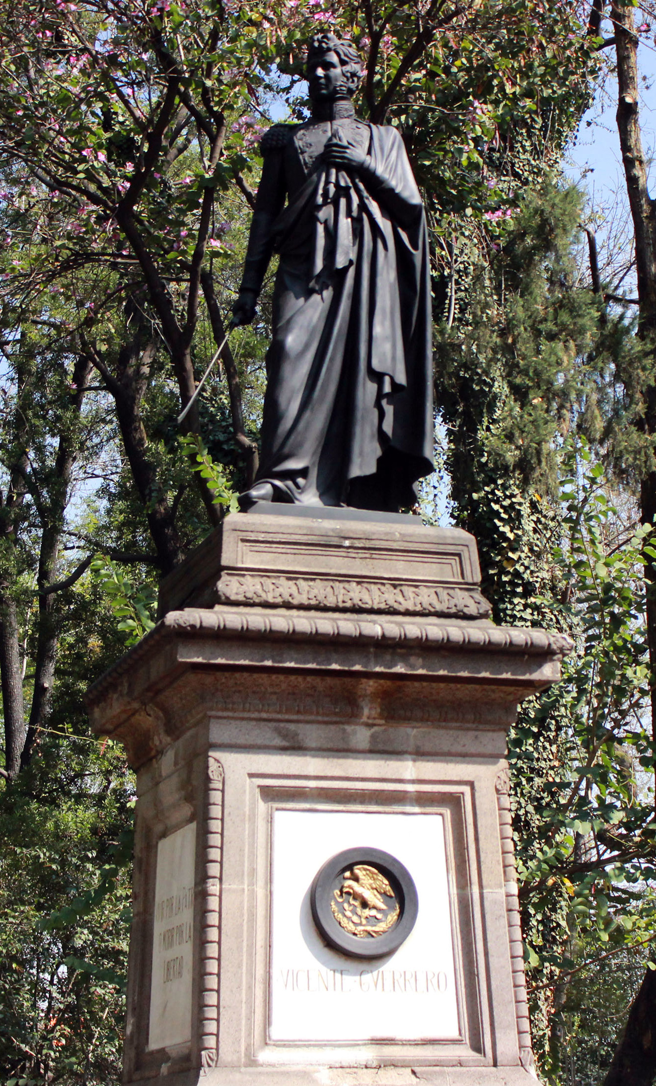 Miércoles 14 de febrero de 2018. La Ceremonia Conmemorativa del 187° Aniversario Luctuoso del Gral. Vicente Guerrero se llevó a cabo en el Jardín San Fernando. Se realizó una guardia de honor, se depositó una ofrenda floral además se entonó el Himno Nacional. Estuvieron presentes: el Lic. Ramón Lépez Vela; Mtro. René Juaréz Albarrán; Lic. Arturo González Cortés; Dr. David Guerrero Flores; Mtro. Guillermo Zamora y Martínez; Lic. Marco Lavanda Corona y el Lic. Julio Zamora Bátiz. Fotografía: Luz Tovar/ Secretaría de Cultura CDMX.